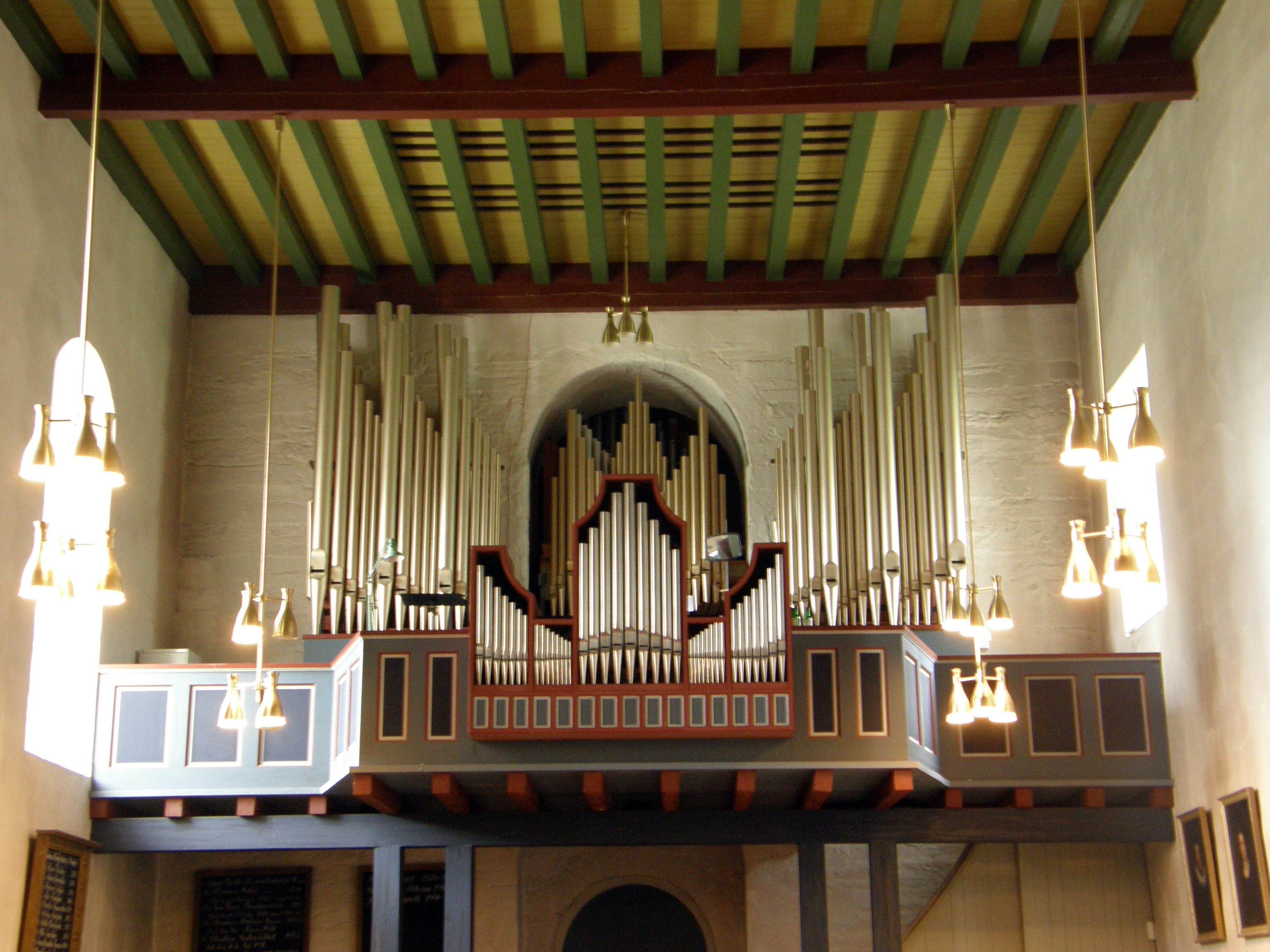 Norderhov kirke, Ringerike (dagens orgel)